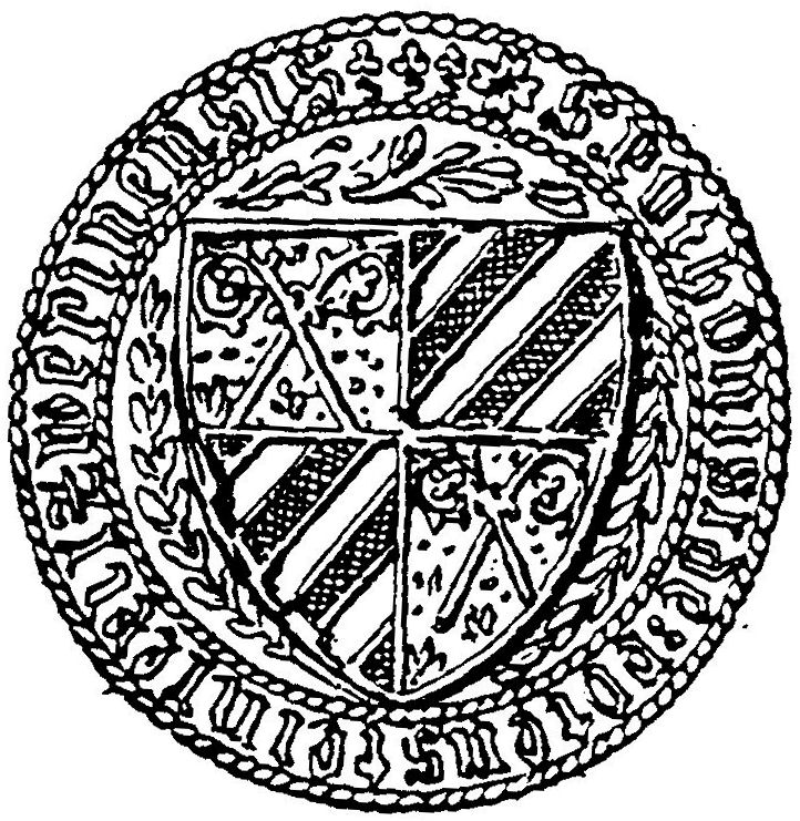 Siegel des Bischofs Potho von Pothenstein († 1390)